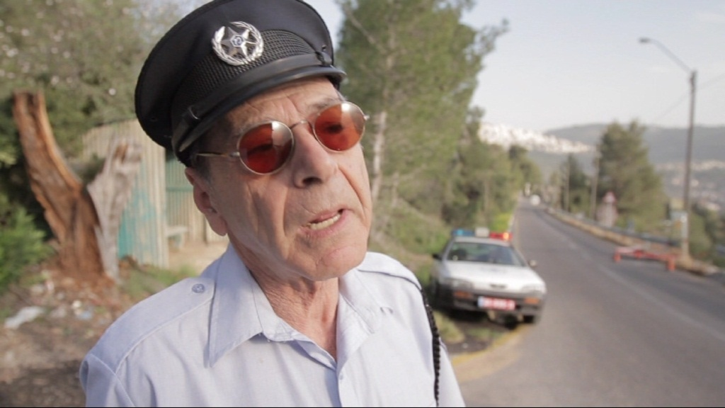 יצחק חזקיה